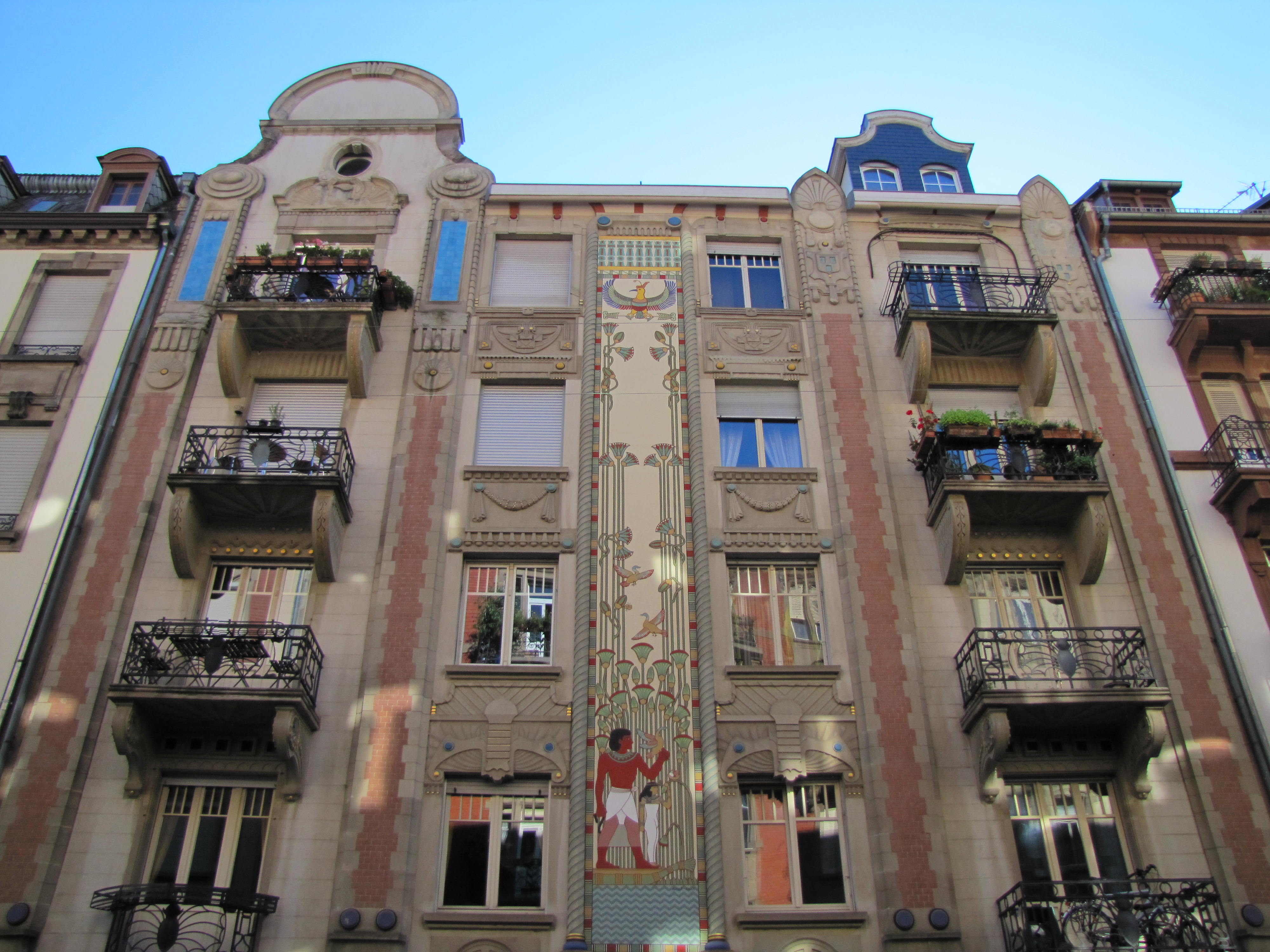 Alsace, Bas-Rhin, Strasbourg, Immeuble, 10, rue du Général Rapp, Architecte: François Scheyder (1907).Informations immeuble